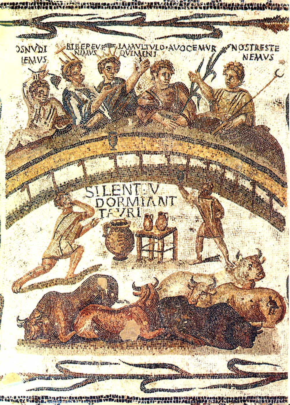 Mosaïque dite Bestiaires festoyant dans l'arène, Thysdrus (El Jem),IIIe siècle. Est une œuvre datée du début du IIIe siècle. Des convives sont représentés autour d’une table avec des domestiques devant eux dont l’un dit Silentiu(m) dormant tauri (« Silence! Les taureaux dorment»). Au premier plan, des taureaux sont allongés. Les convives du banquet ont divers symboles à leurs côtés; le bruit de la discussion aboutit au réveil de quelques animaux qui portent tous des symboles sur leur croupe. Cette mosaïque symbolise le poids des associations chargées d’organiser les jeux, dénommées sodalités, dans l’Afrique romaine.